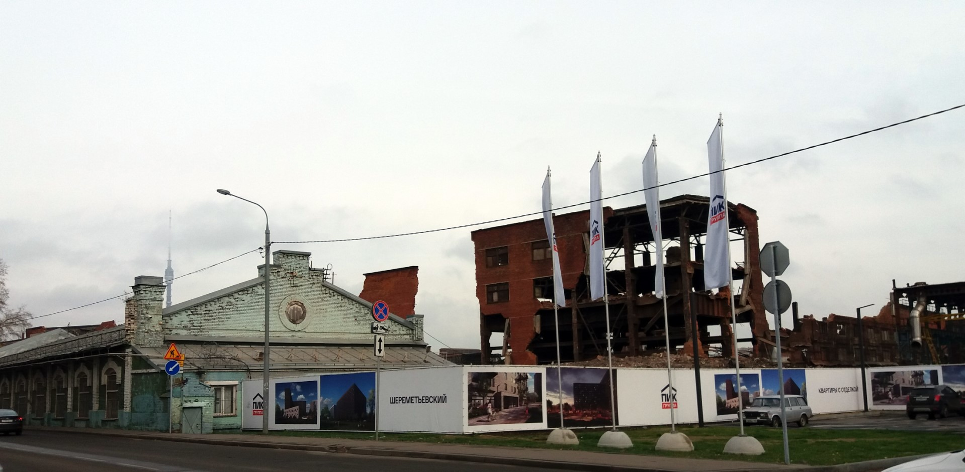 Москва. Остатки завода "Борец" на ул.Складочная - вид от д.1 стр.43 (бывший завод 19века Густава Листа). Ноябрь 2018г. По состоянию на 2020, одноэтажное здание еще стоит, остальное снесено.